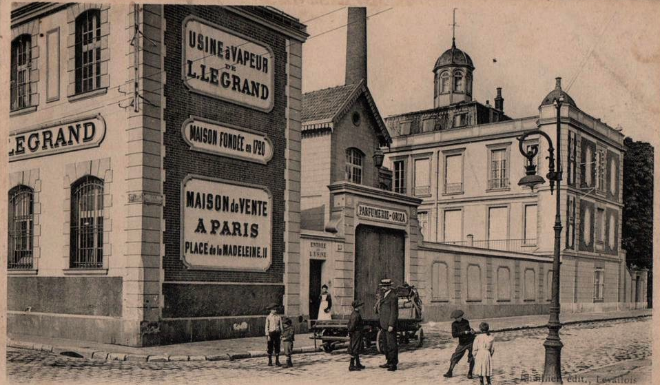 Carte postale des années 1900, vue de l'usine Oriza L. Legrand à Levallois (France).